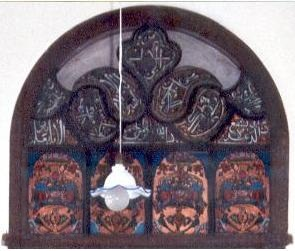 سردر بهای چوبی_طرح بته جقه_مزین به نقاشی پشت شیشه